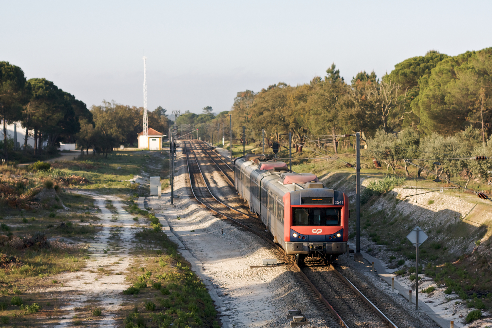 Tipo: Comboio Regional 3700 #Faro - Barreiro# Local: Estação de Vale do Guizo #Linha do Sul, PK 87# Data e hora: 1 de Abril de 2009 #07h34# Material: Automotora 2241 #Unidade Tripla Eléctrica#